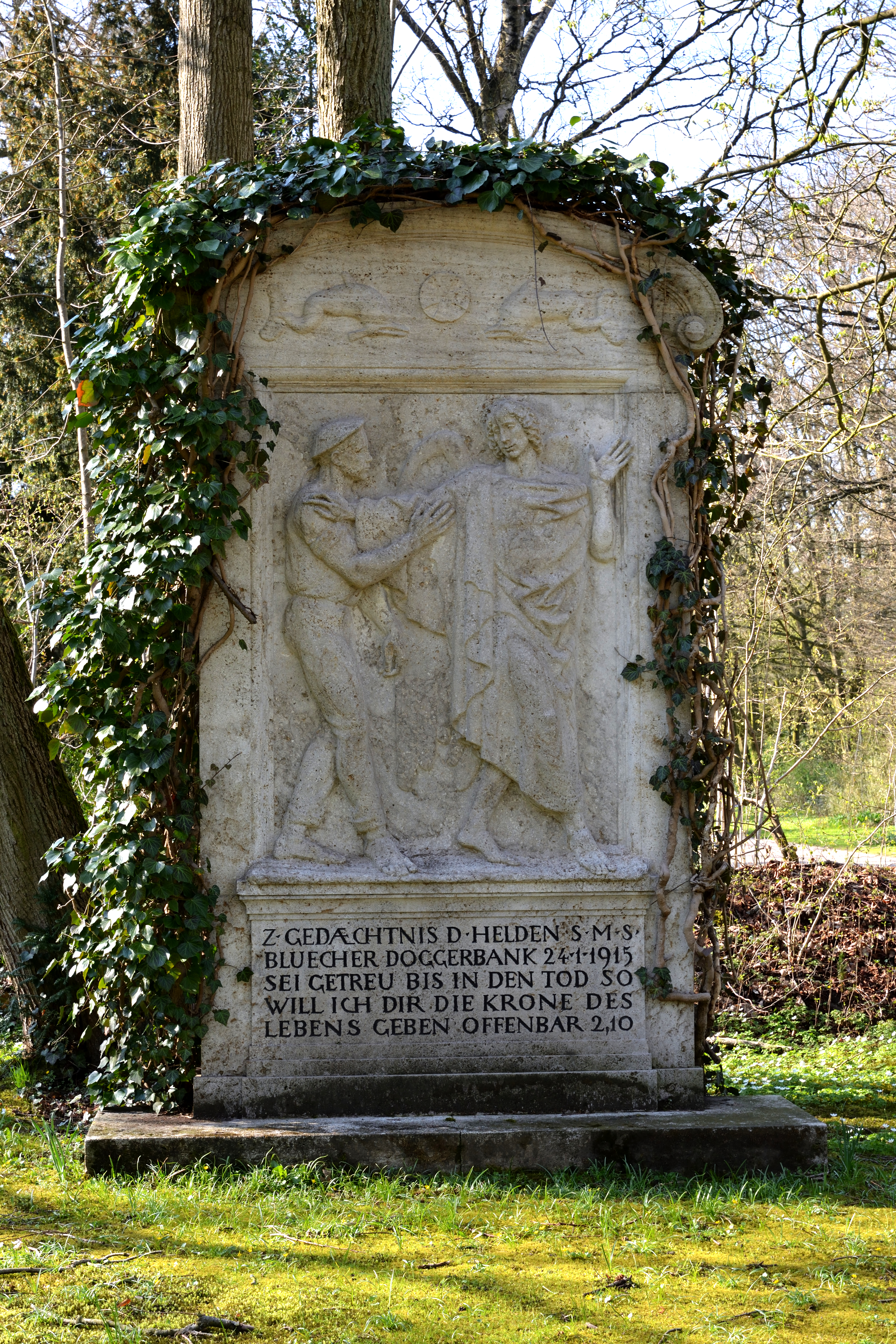 Impressionen vom Nordfriedhof Kiel